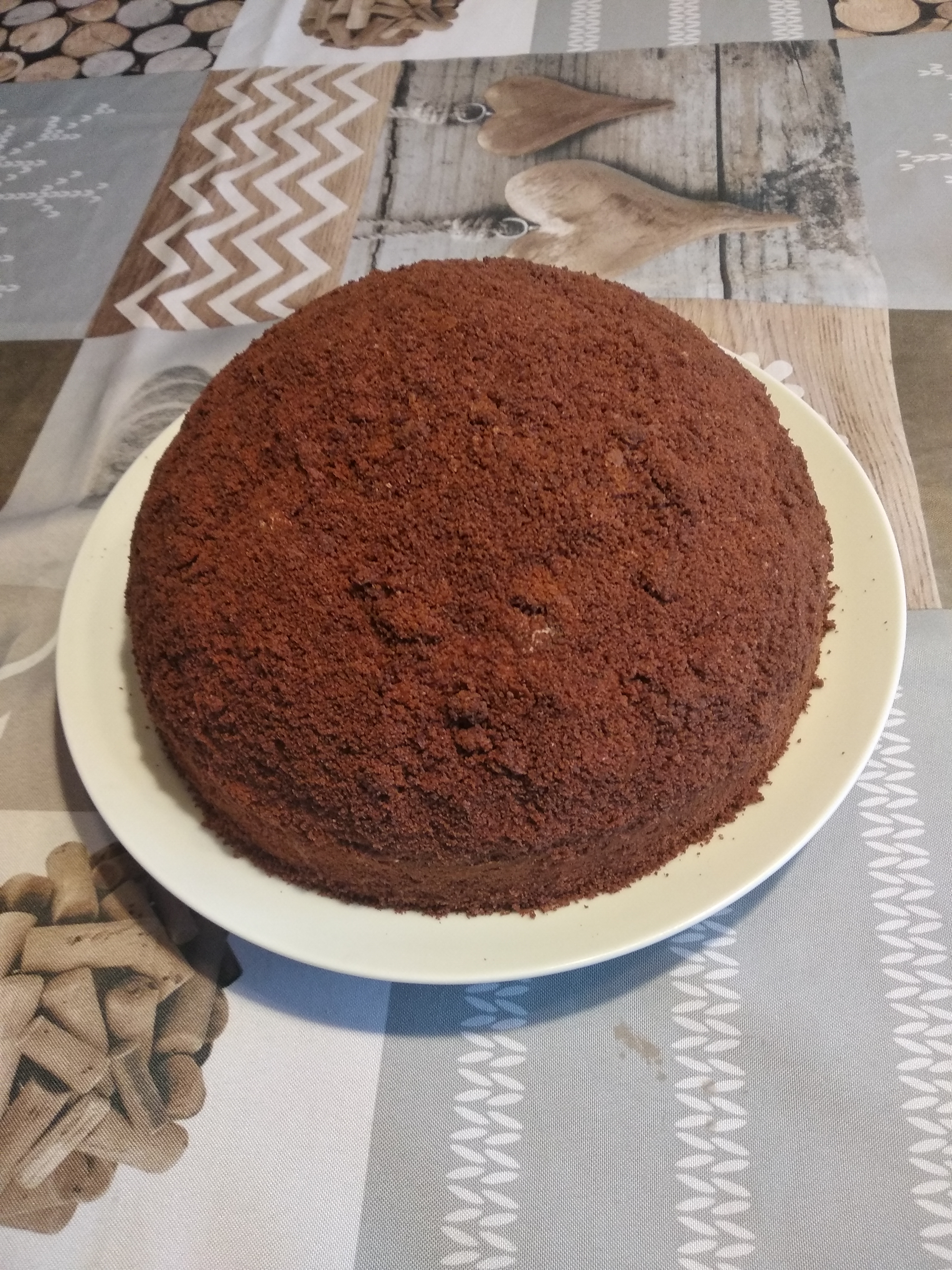 Obrázek klasického krtkova dortu